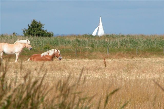 Birkholm landscape